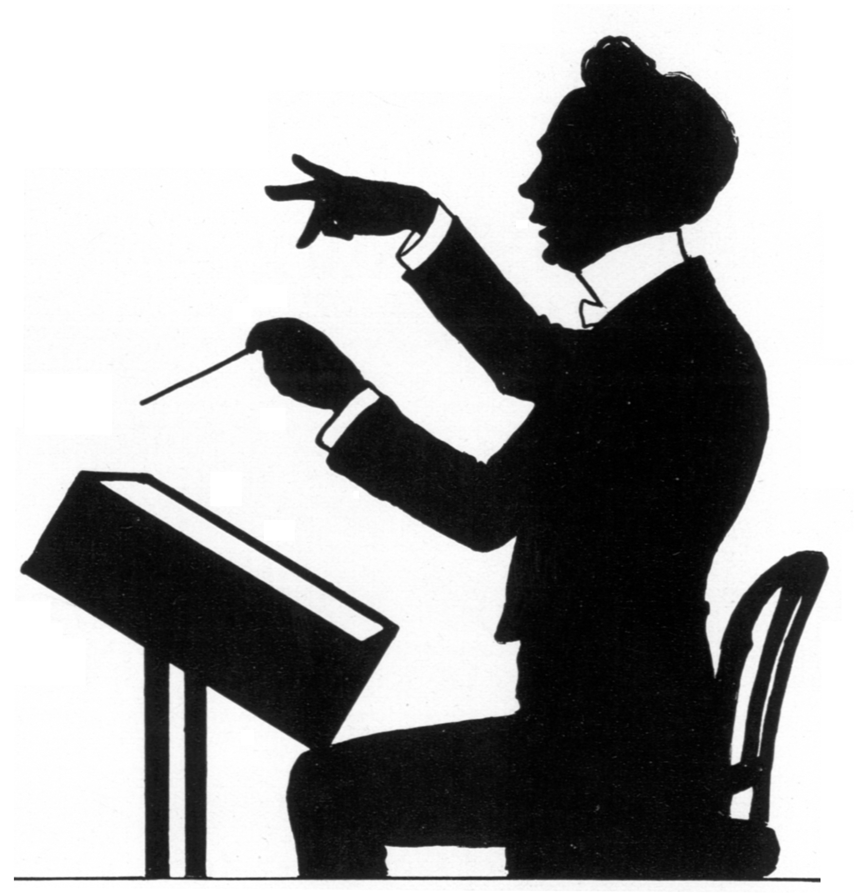 Karikatur